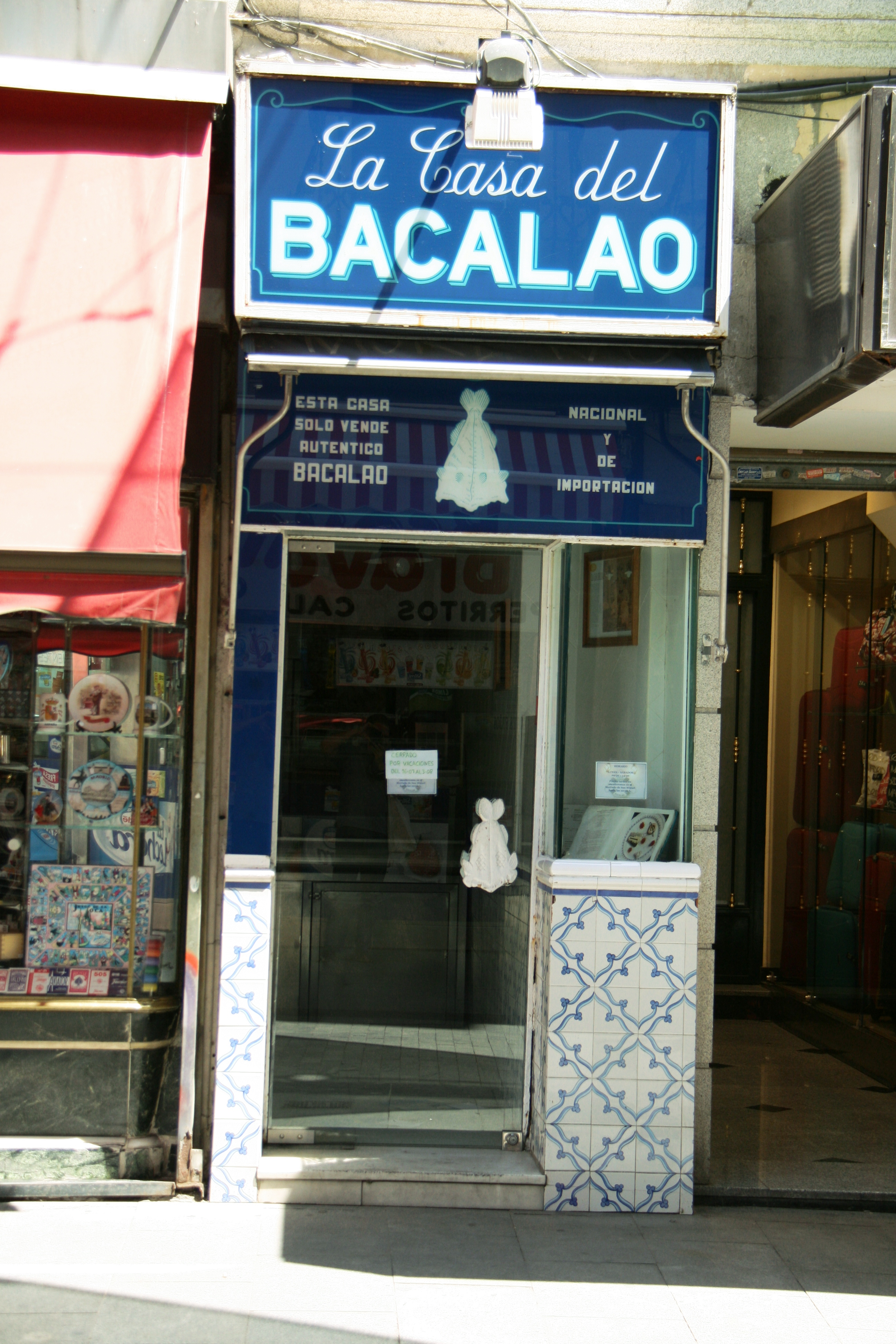 Casa Bacalao - Tienda especializada